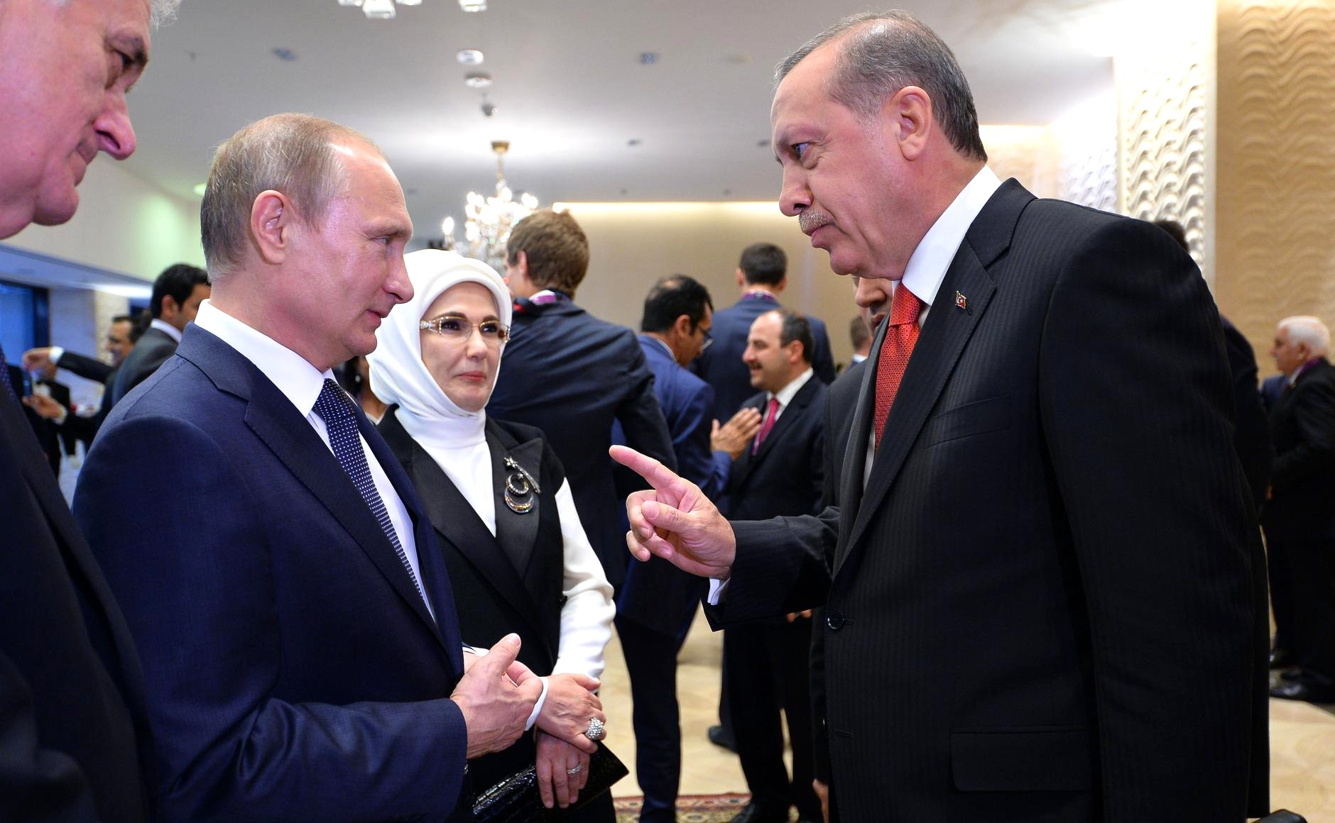 Церемония открытия Первых Европейских игр. Президент России Владимир Путин с Президентом Турции Реджепом Тайипом Эрдоганом